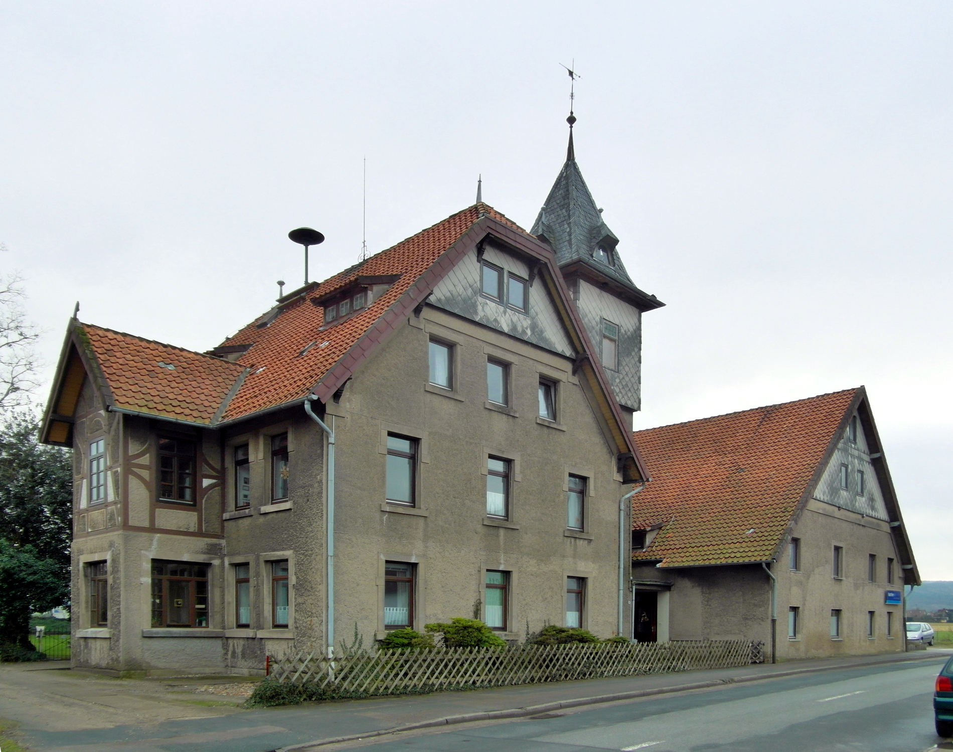 Die Basse'sche Brotfabrik im heutigen Wennigser Ortsteil Holtensen in der Region Hannover entstand bei der Basse'sche Windmühle. Sie wird heute als Wohnraum genutzt.